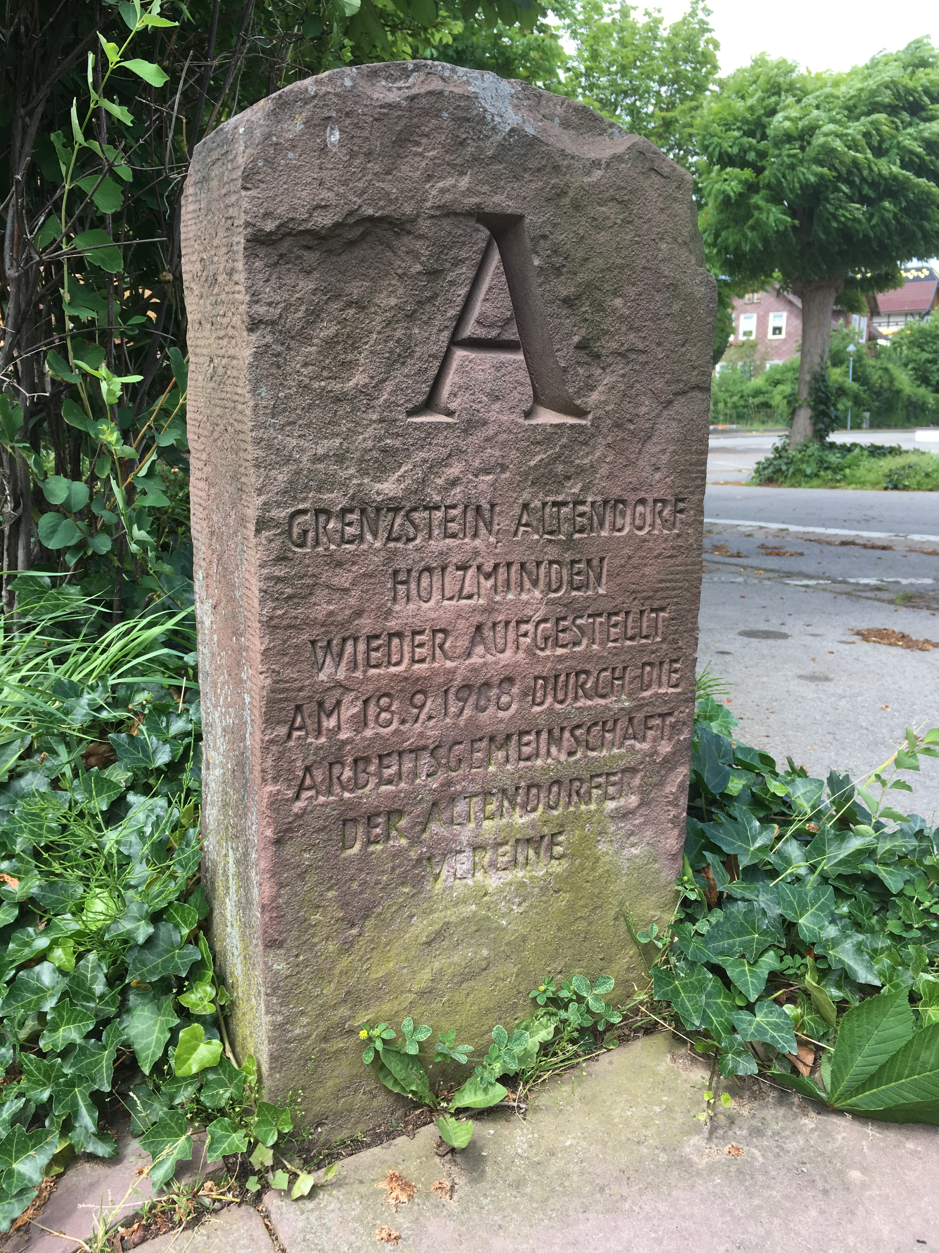 Grenzstein zwischen Holzminden und Altendorf, 1968 wieder errichtet an der Straße "An den Teichen"